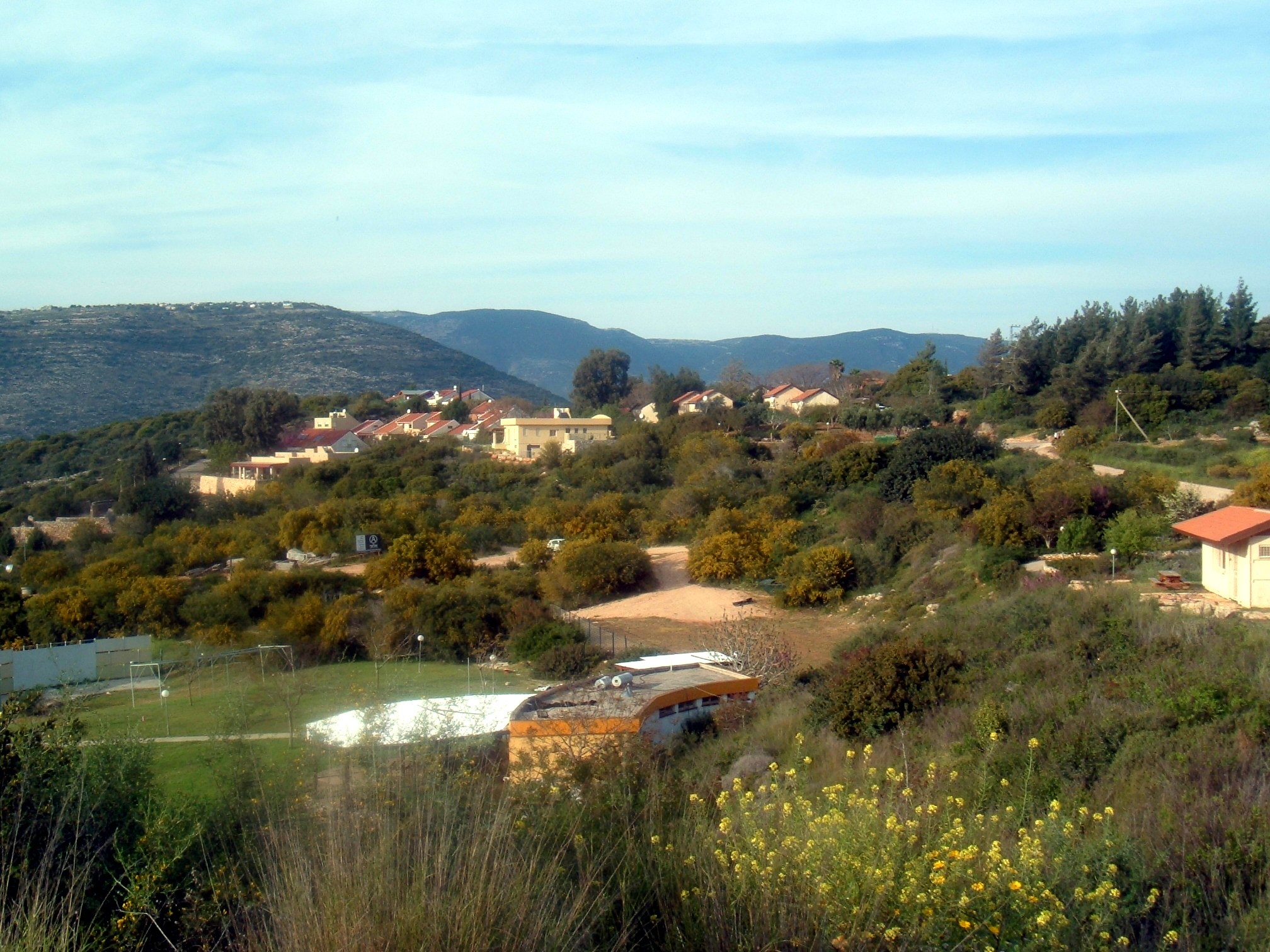 Lottem.jpg